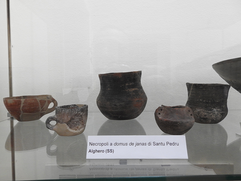 Ceramiche Necropoli Santu Pedru